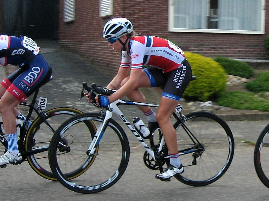 Miriam Bjørnsrud (Hitec Products) in Holland Hills Classic 2016